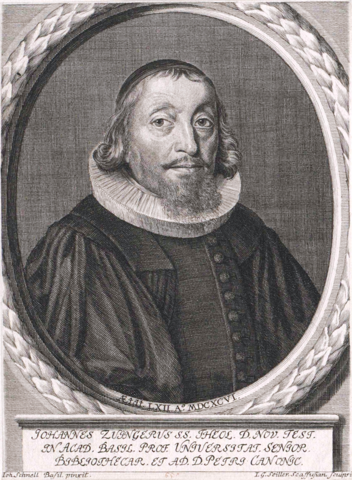 Johannes Zwinger (1634–1696)